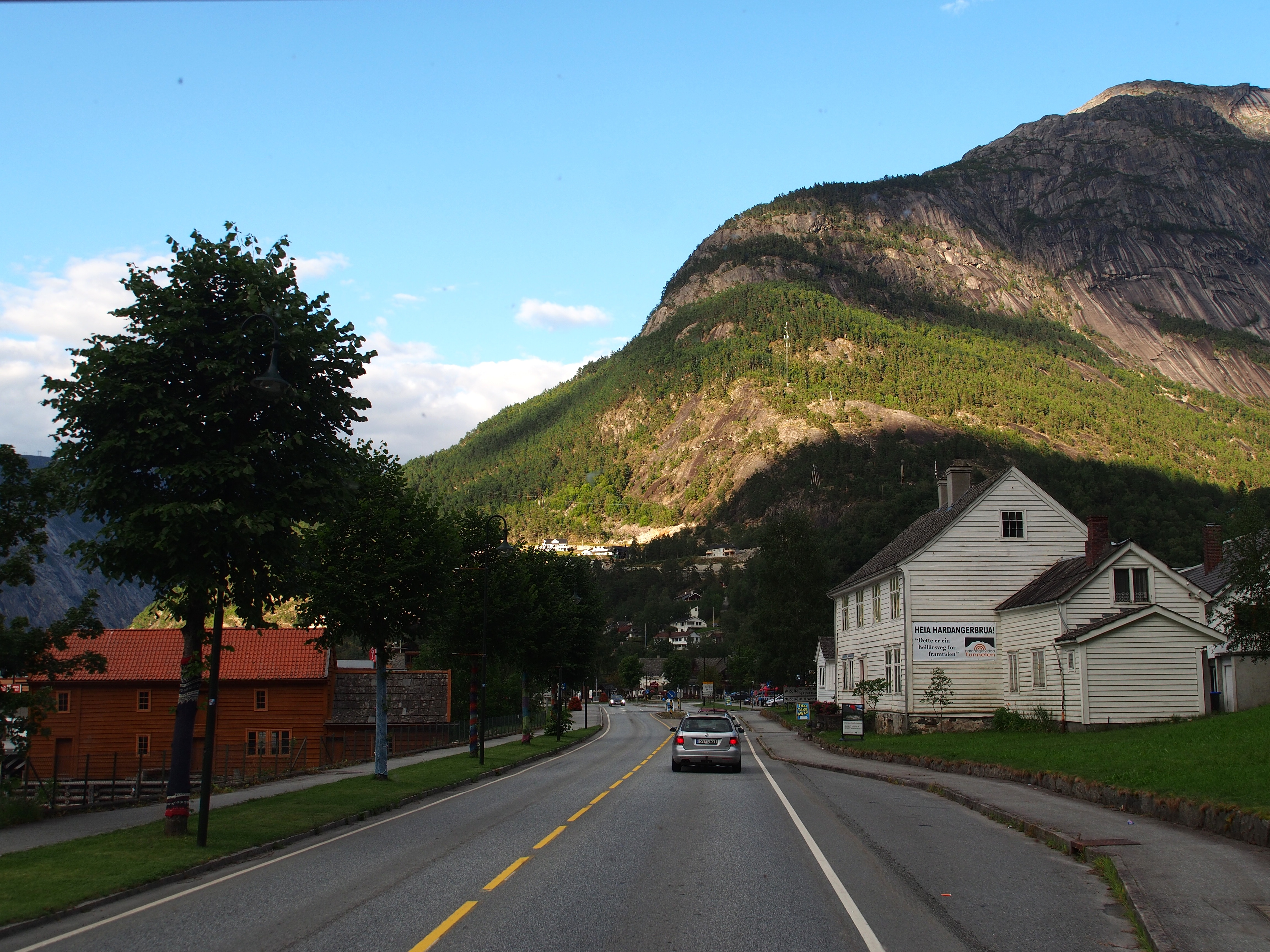 Village of Eidfjord - 2013.08